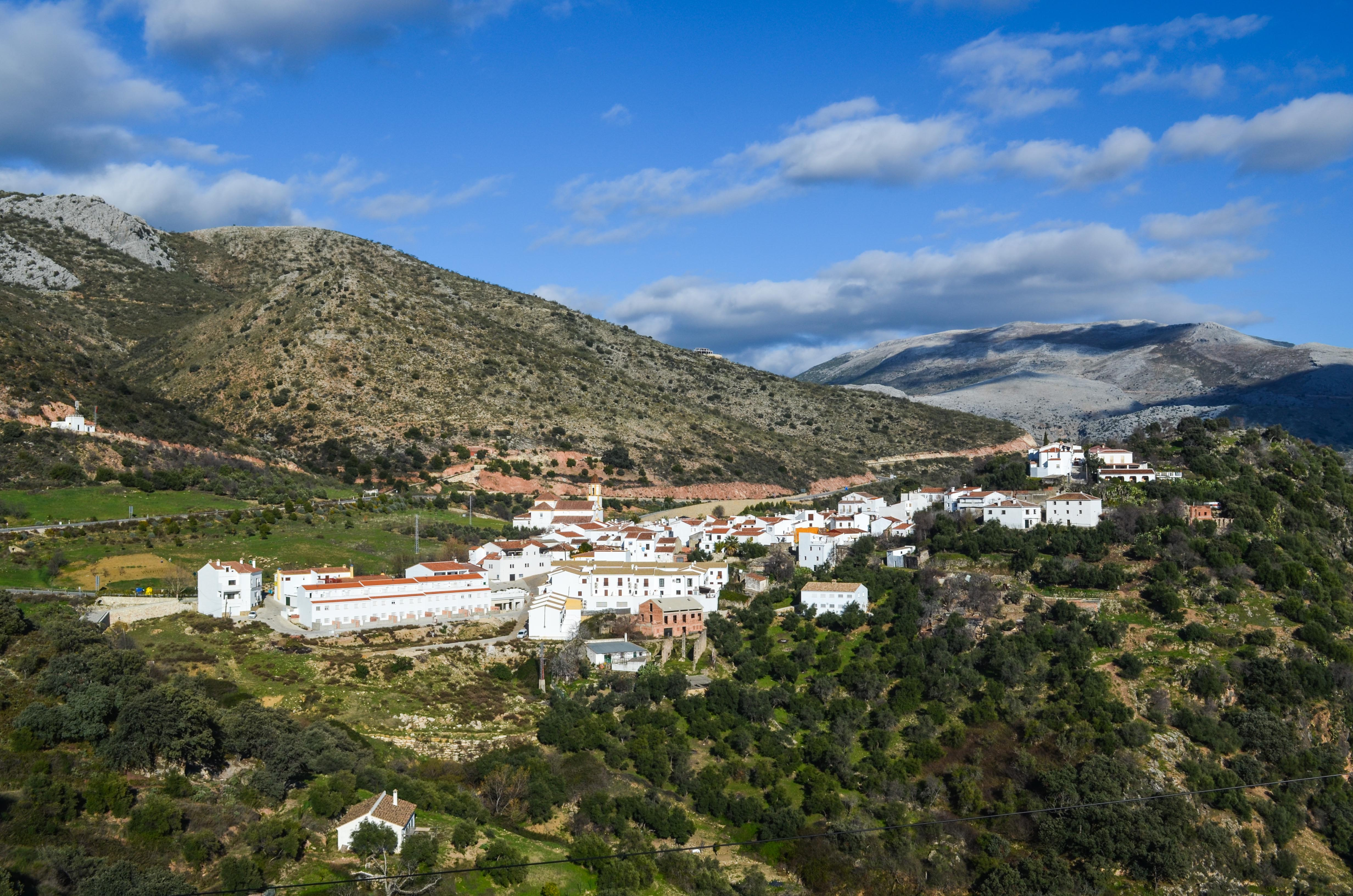 Atajate